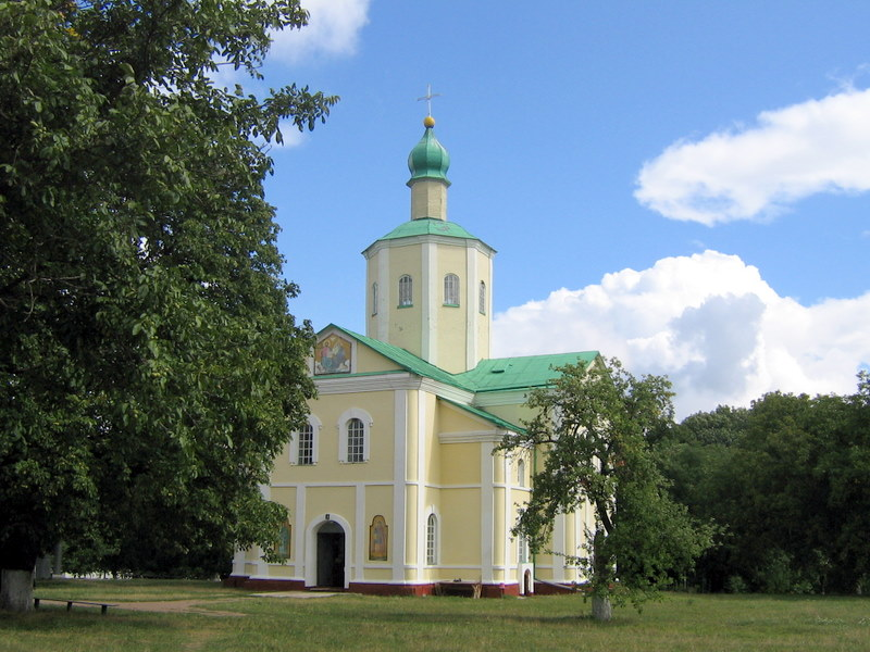 Мотронинський монастир в Мельниках. Троїцька церква Мотронинського монастиря. Троїцька церква. 2007 рік. Свято-Троїцький храм Мотронинського монастиря, сучасний вигляд.